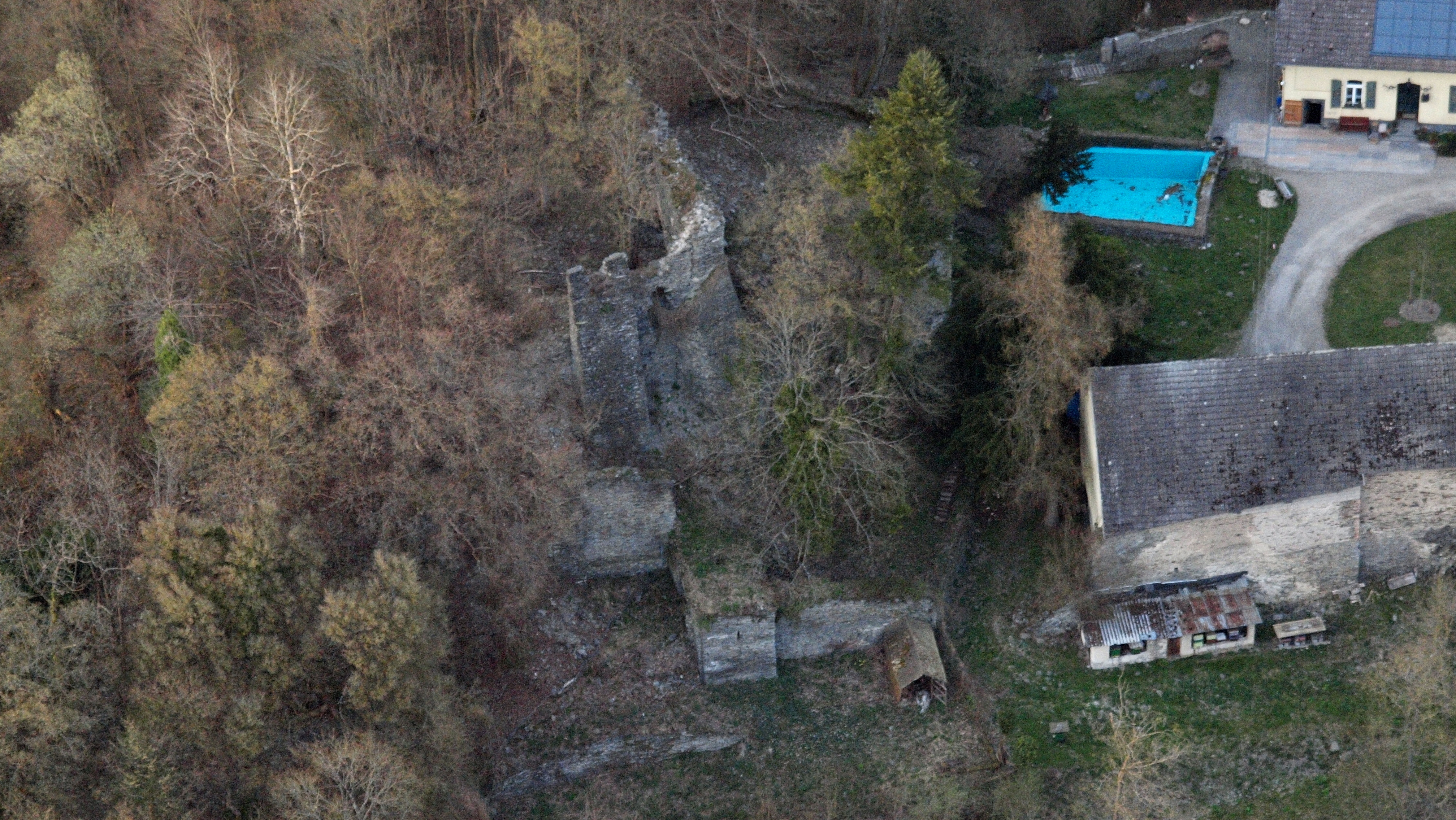 Burg Braunsberg aus westlicher Richtung, Luftaufnahme (2015)